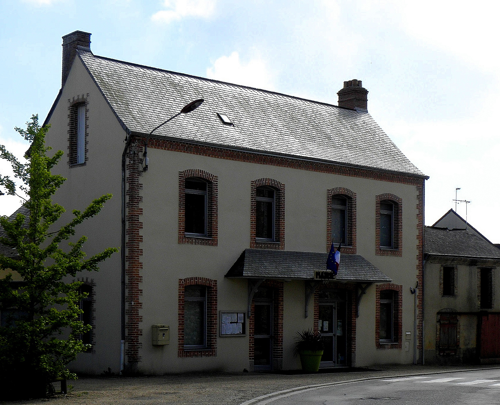 Mairie de Pommerieux (53).